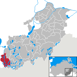 Mirow in Mecklenburg-Vorpommern, Landkreis Mecklenburg-Strelitz